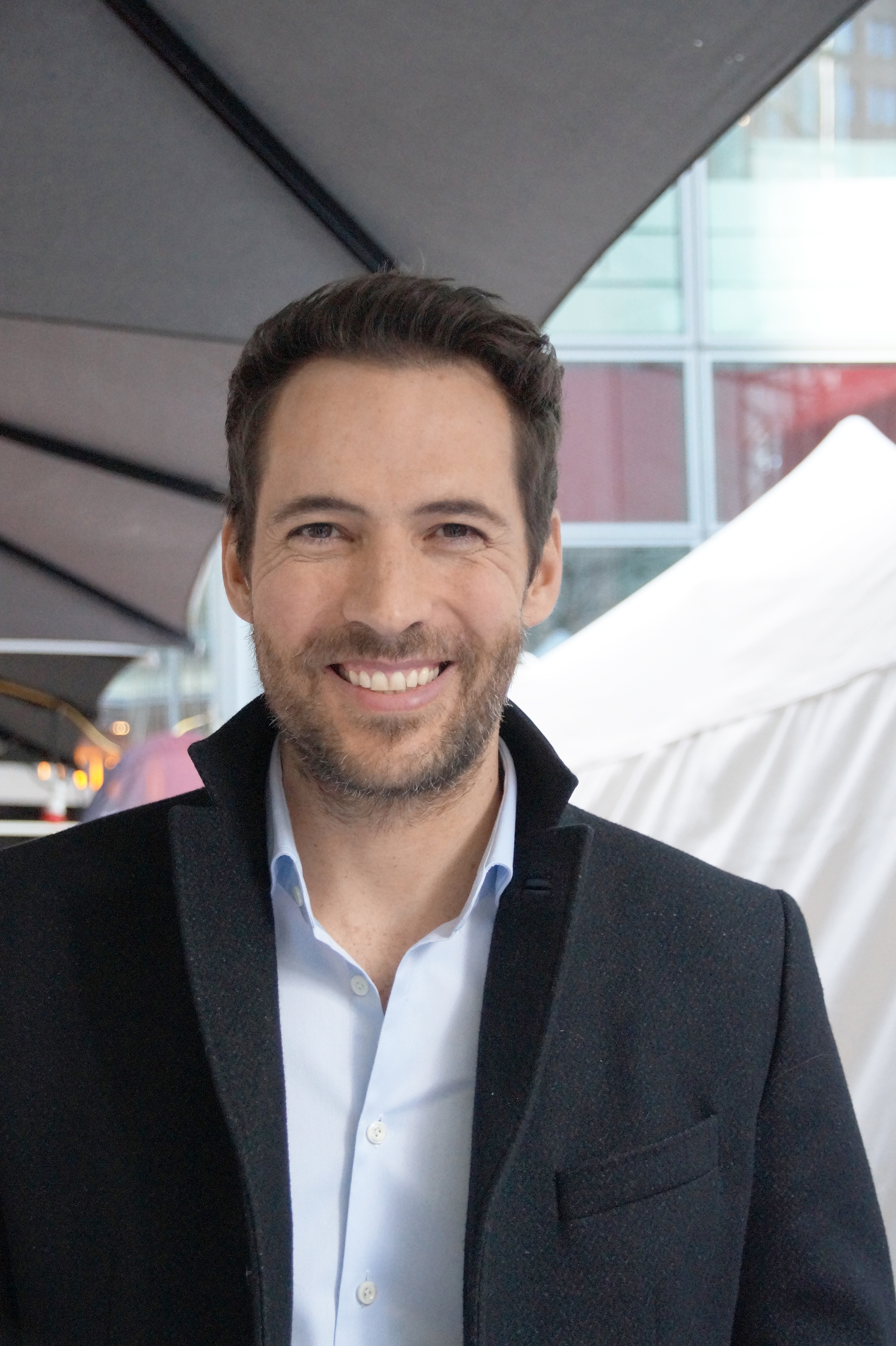 Alexander Mazza bei der Verleihung des Kurzfilmpreises "Blaue Blume", am 10.02.2016, im Sony Center Berlin.